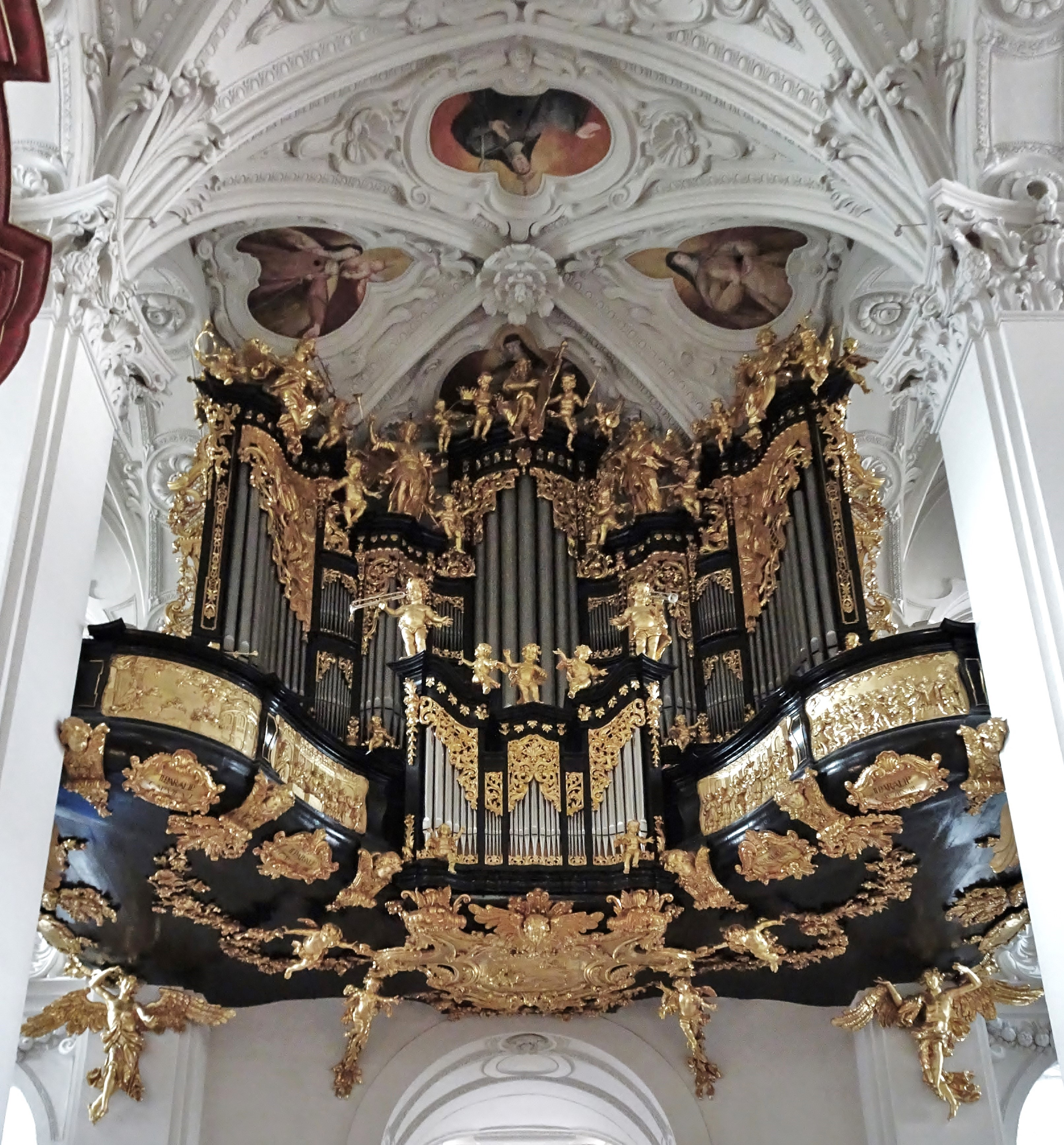 Pfarr- und Wallfahrtskirche Mariazell, Chorempore und Orgel